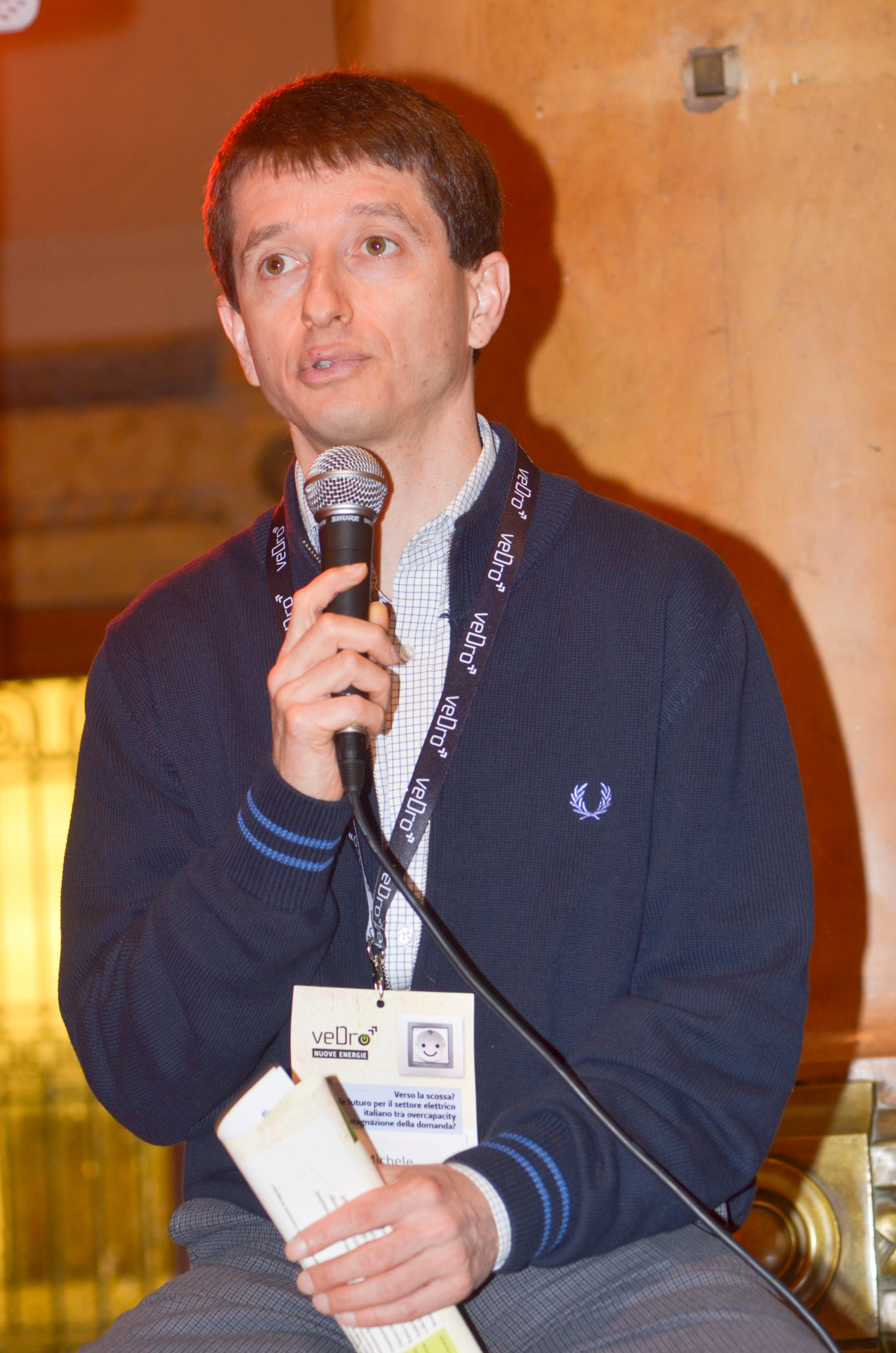 Michele Governatori a "veDrò nuove energie" a Genova.